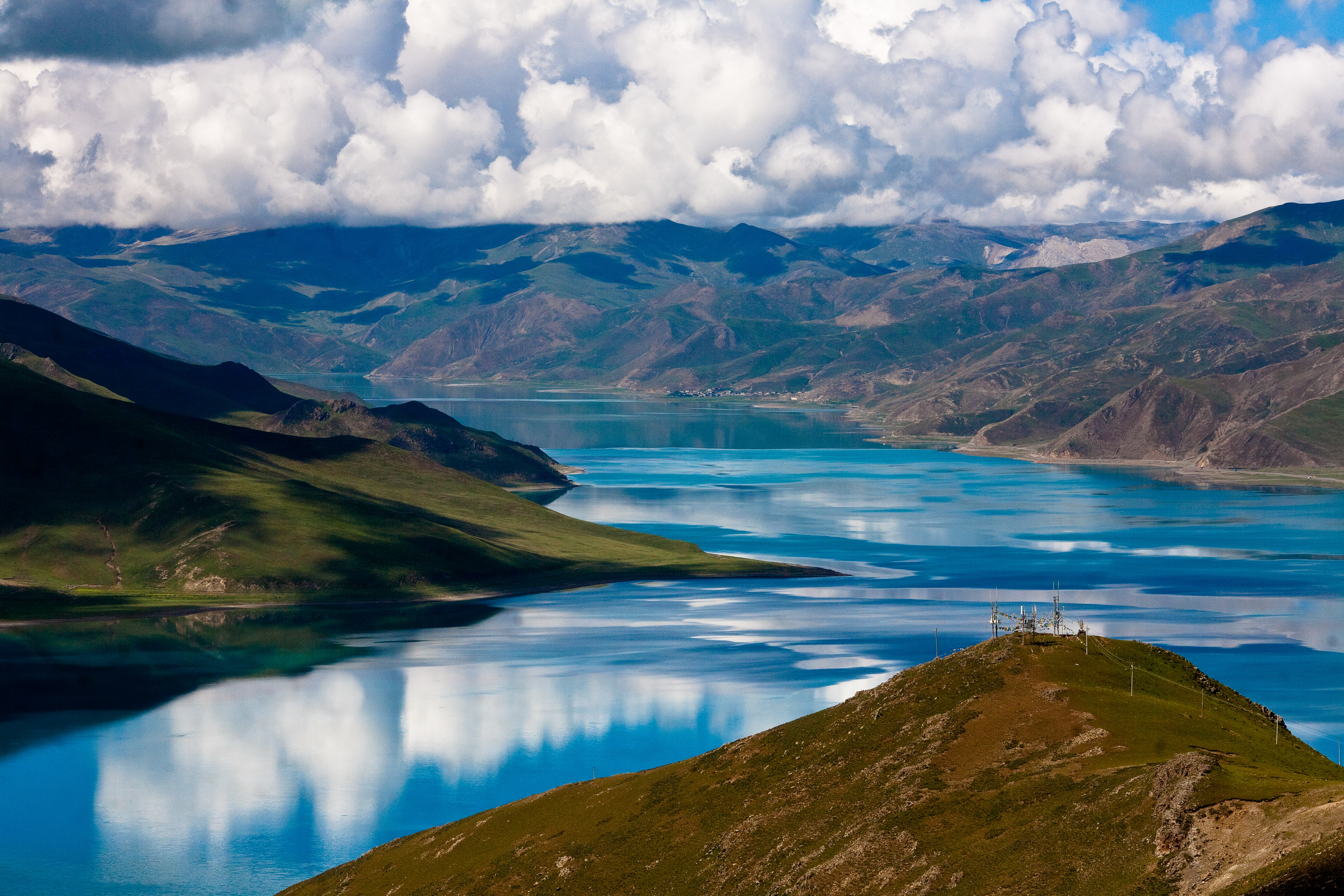 Yamdrok Lake, Tibet 2